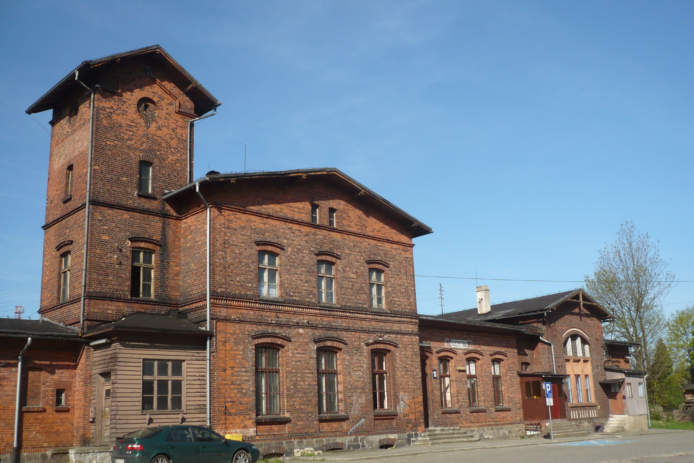 Stacja kolejowa w Szytnej